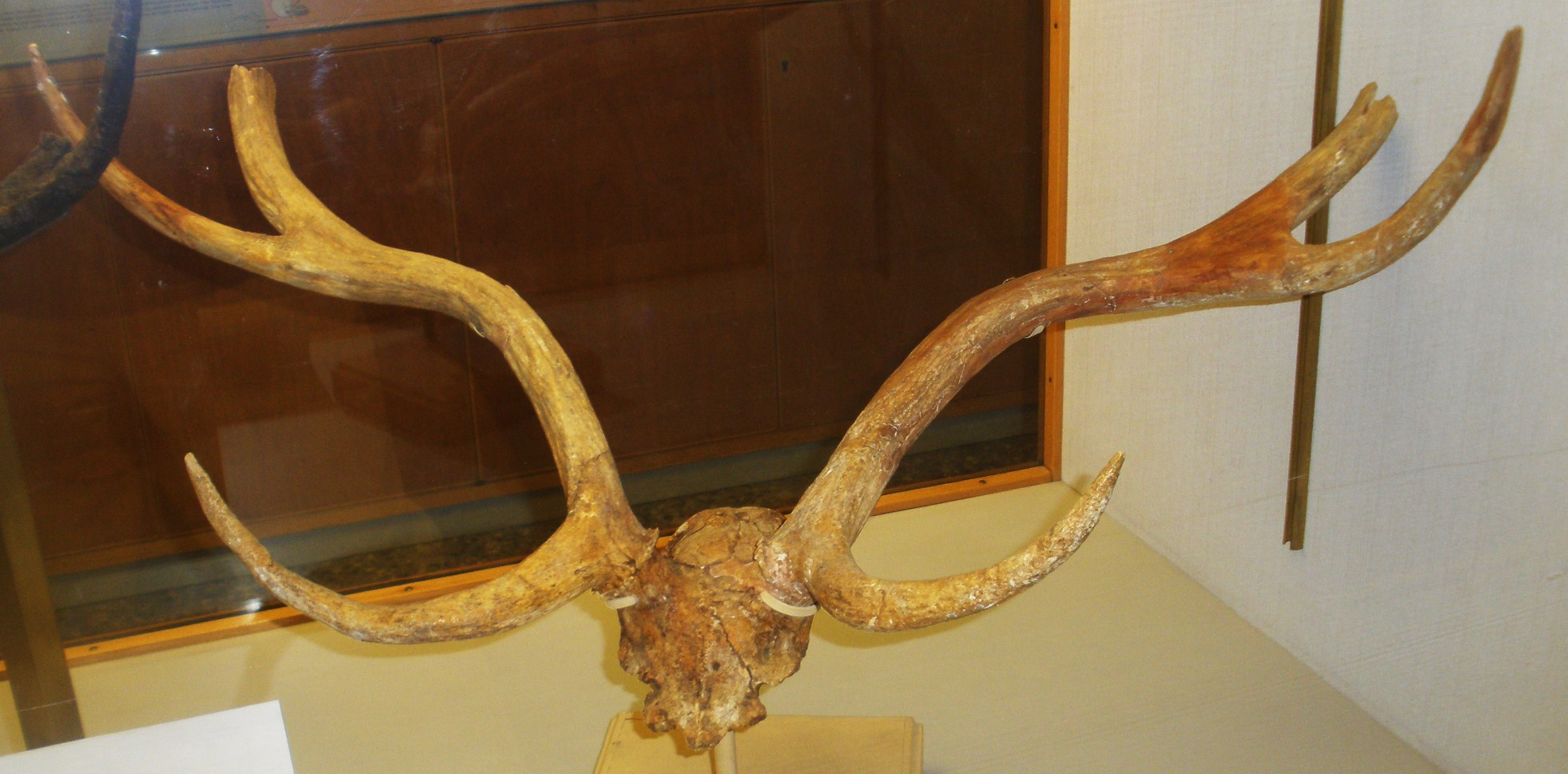 Fossil of Pseudodama, an extinct mammal -- Topok the picture at Museo di Paleontologia di Firenze